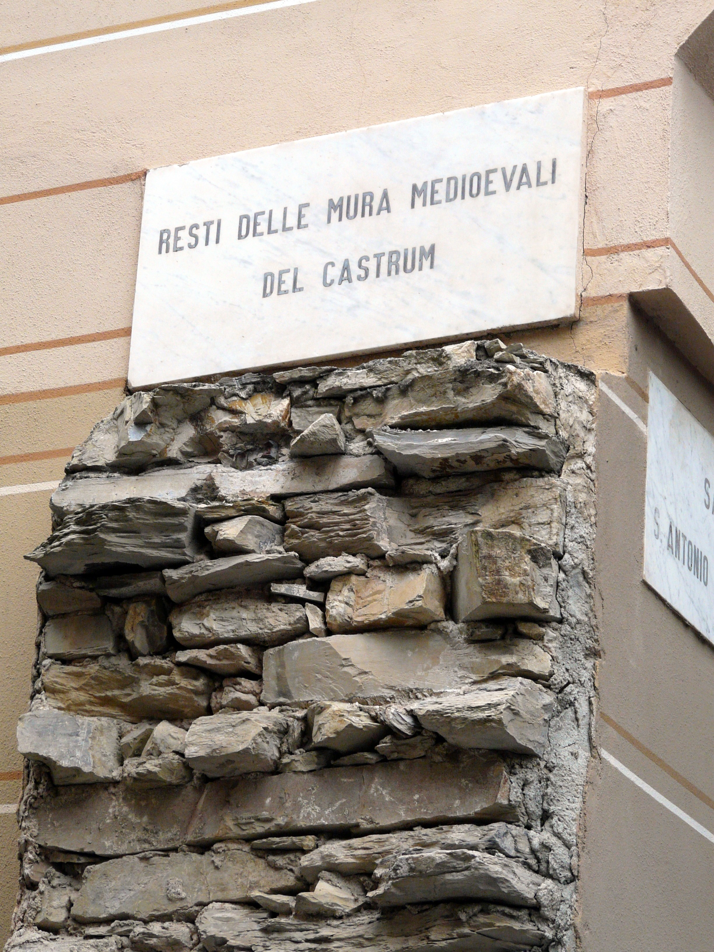 Resti delle vecchie mura medievali del castrum di Chiavari, Liguria, Italia